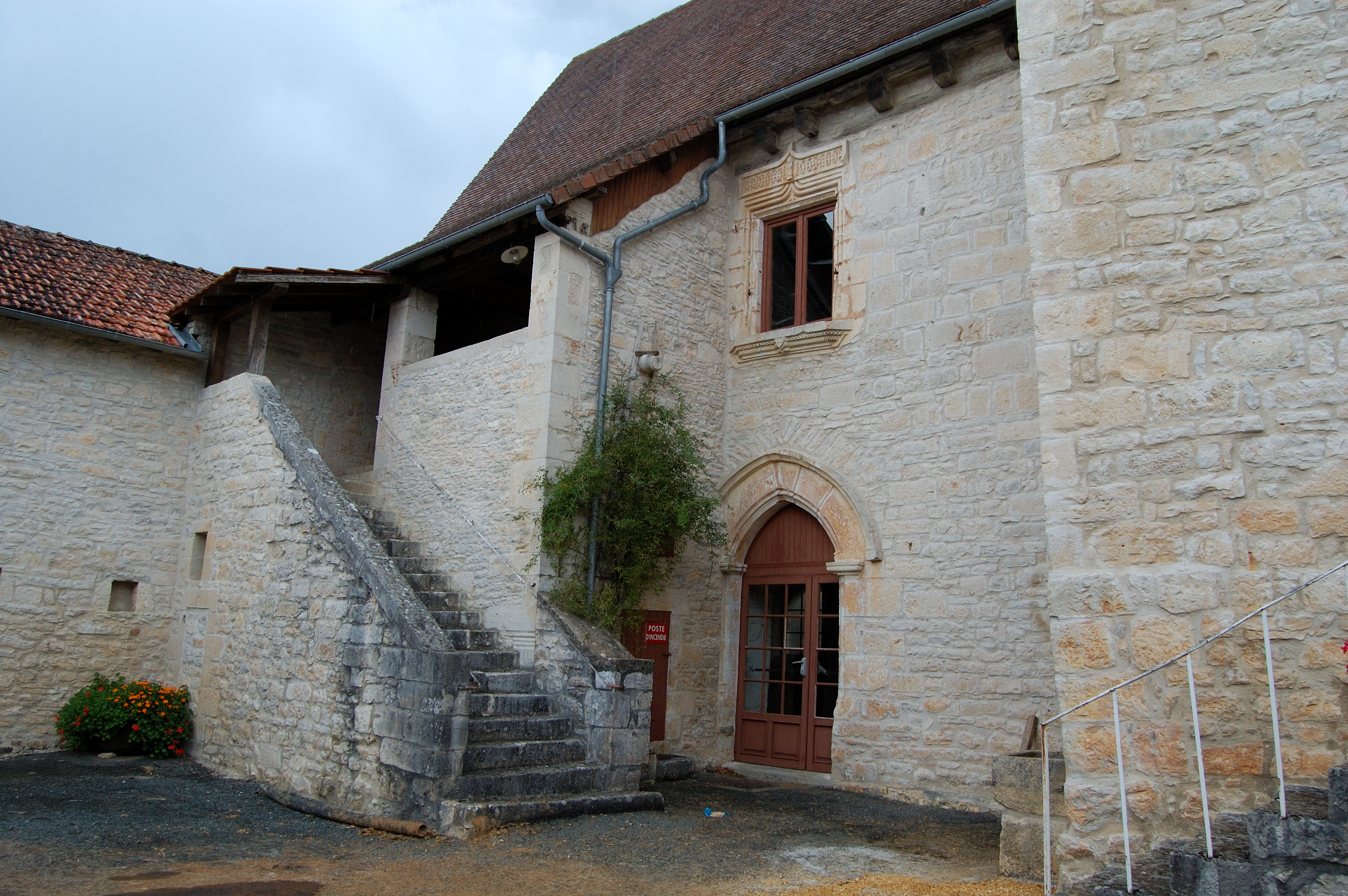 Salle des fêtes dans un bâtiment rénové (Gabillou - Dordogne).